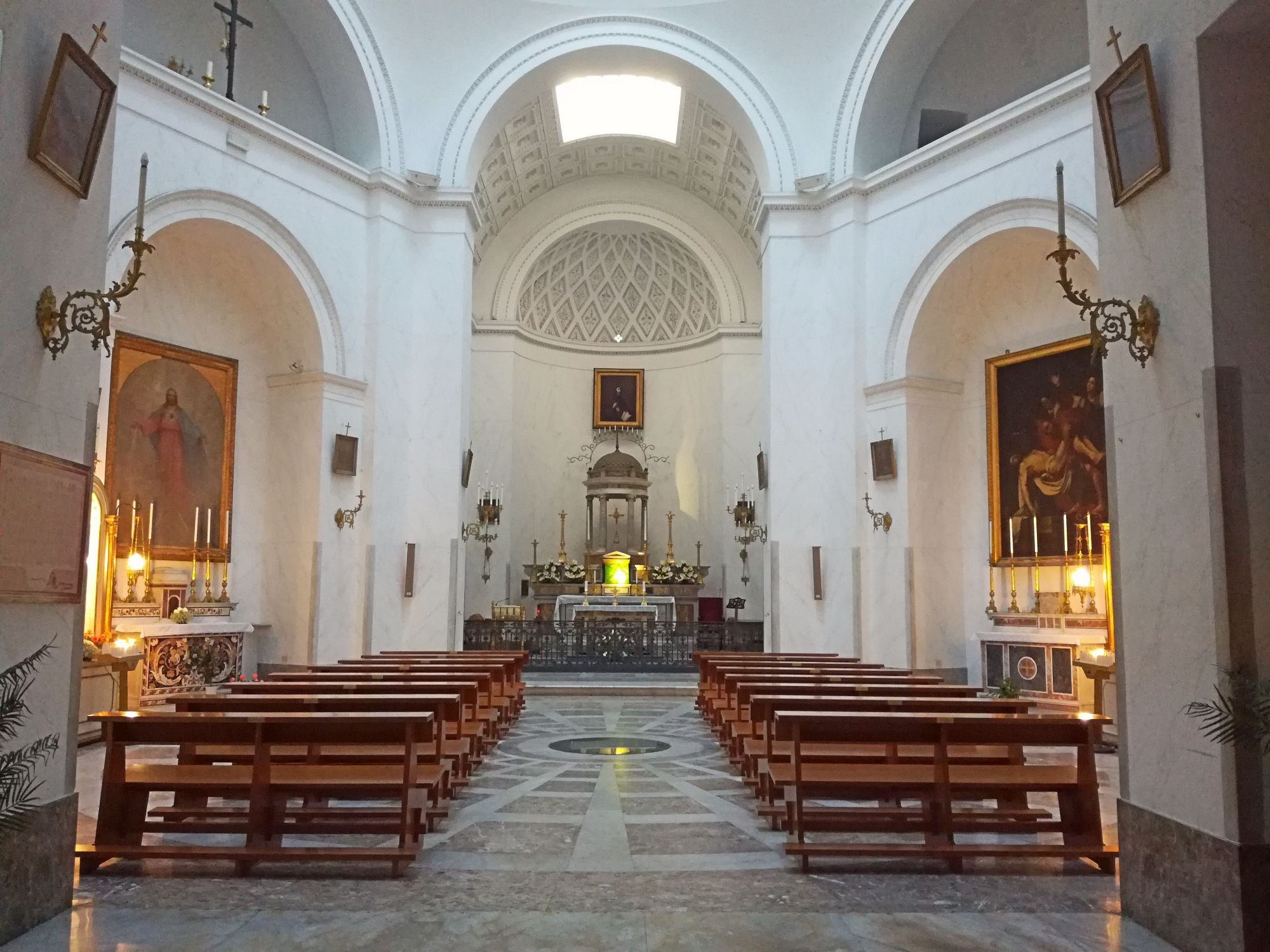 Cappella del Santissimo Sacramento della Basilica di San Francesco di Paola (Napoli)